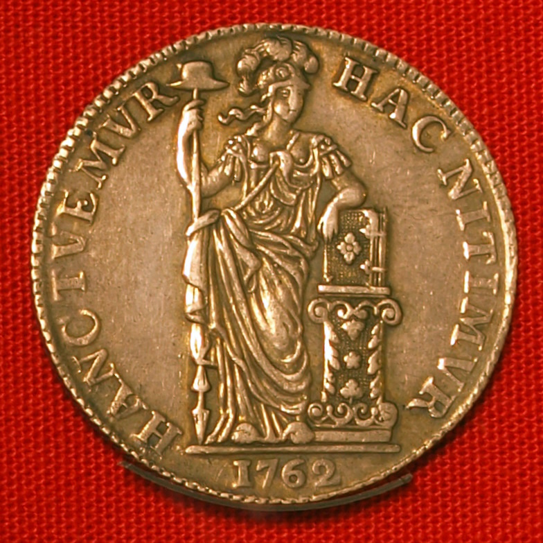 Holland, gulden 1762.